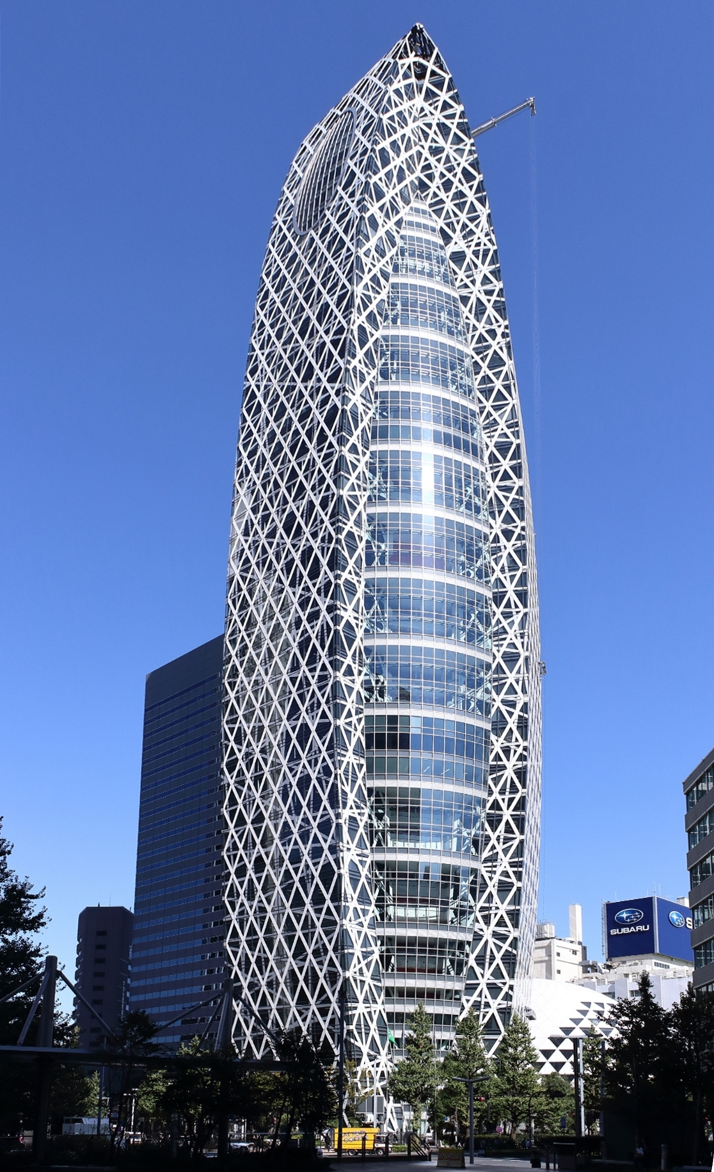 モード学園コクーンタワー、東京都新宿区。